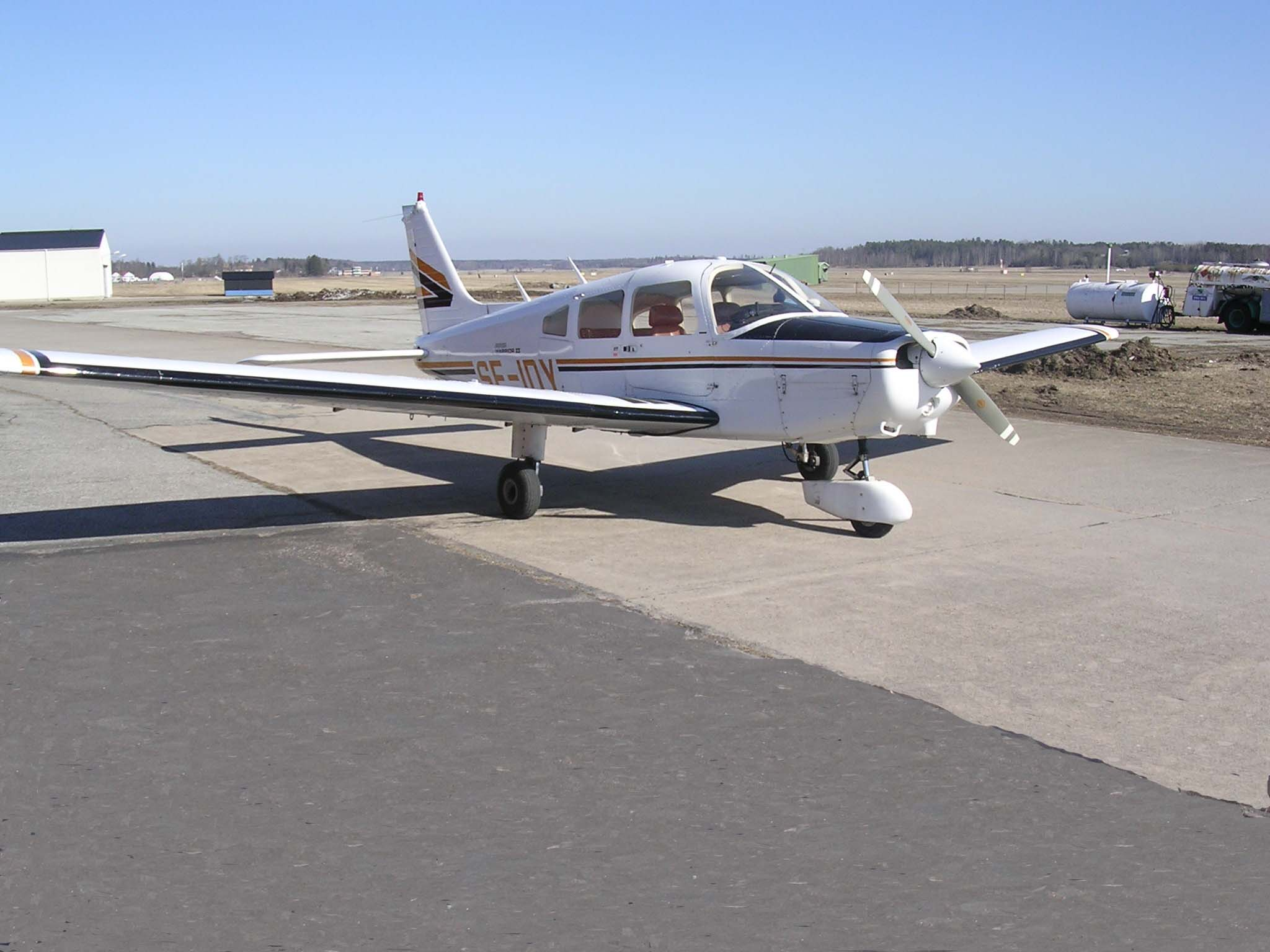 Piper PA-28-161 Cherokee Warrior II